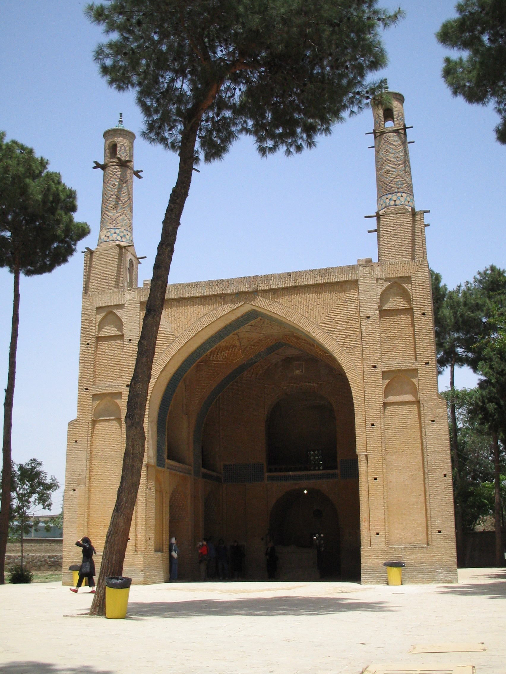 Menar-e-jomban, Esfahan, Iran.